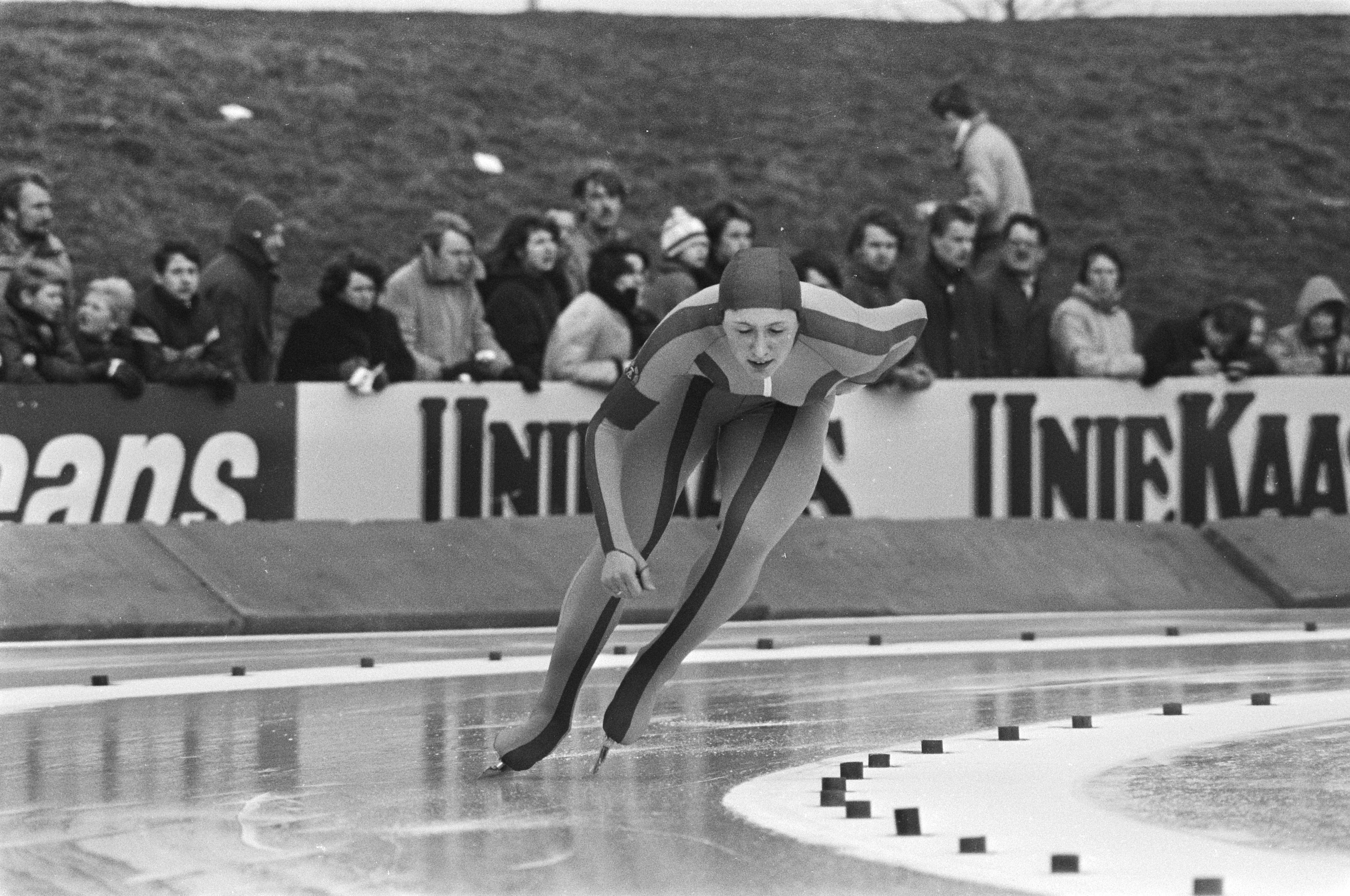 Collectie / Archief : Fotocollectie Anefo Reportage / Serie : [ onbekend ] Beschrijving : WK Sprint schaatsen in Alkmaar. Karin Bush in aktie Datum : 6 februari 1982 Locatie : Alkmaar, Noord-Holland Trefwoorden : SCHAATSEN, sport Fotograaf : Bogaerts, Rob / Anefo Auteursrechthebbende : Nationaal Archief Materiaalsoort : Negatief (zwart/wit) Nummer archiefinventaris : bekijk toegang 2.24.01.05 Bestanddeelnummer : 931-9584